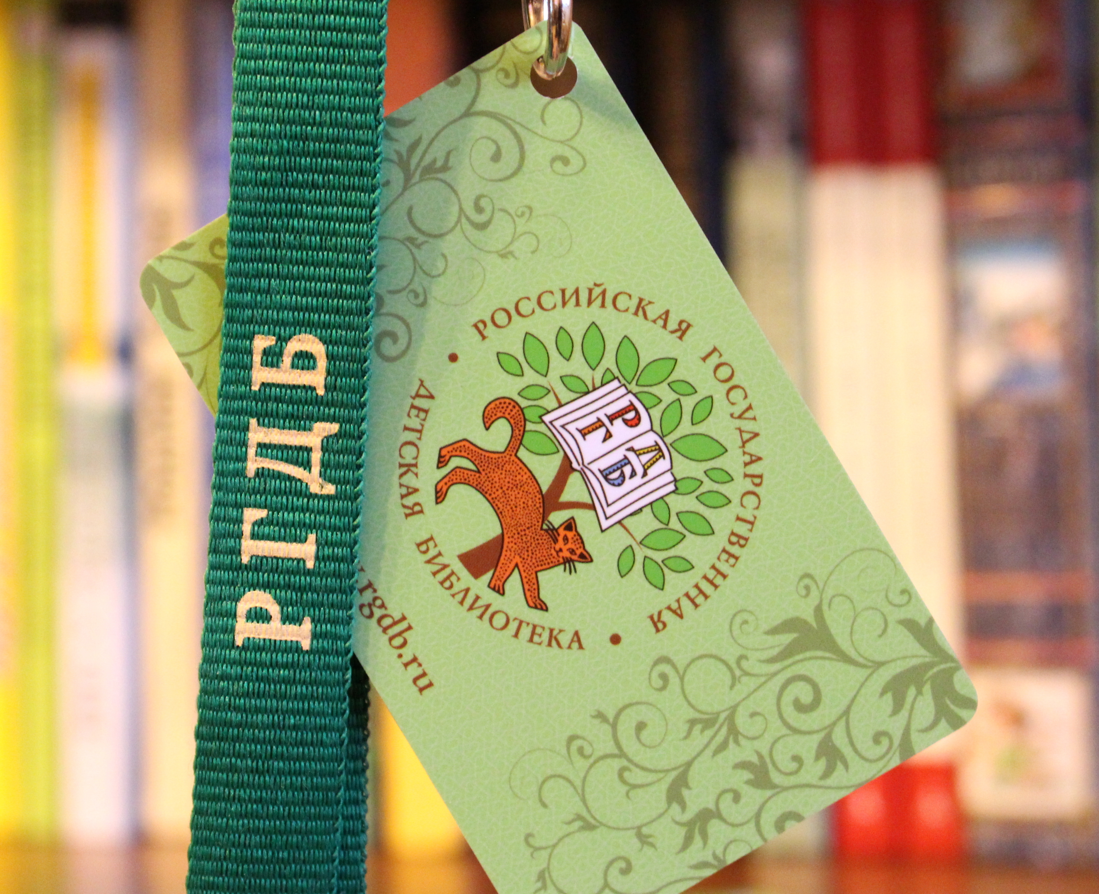 Пластиковый электронный билет Российской государственной детской библиотеки с логотипом учреждения.